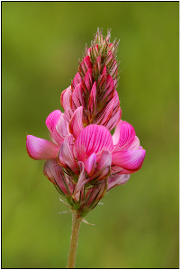 Natur in Embrach